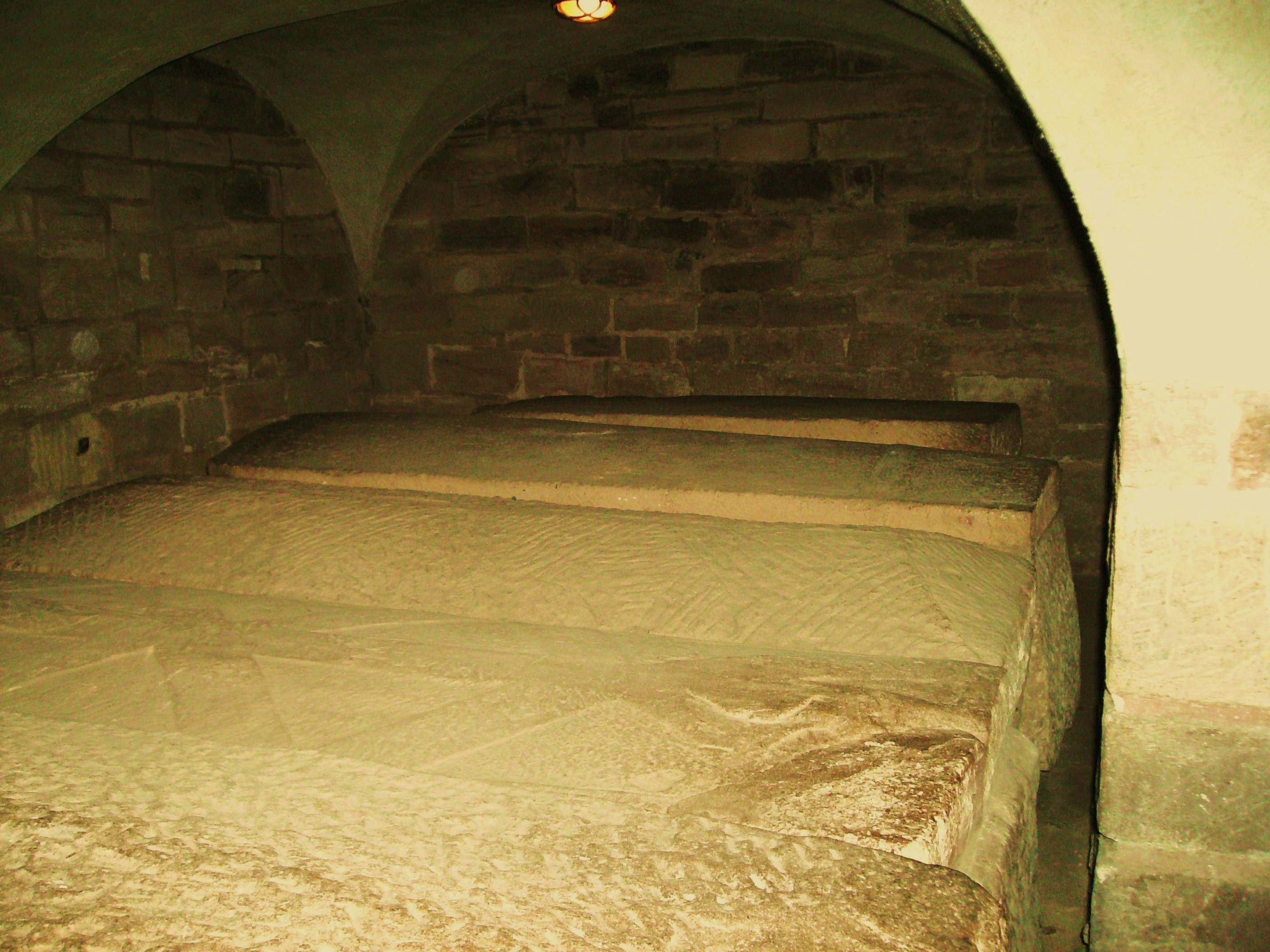 Wormser Dom: Saliergruft, rechte Seite